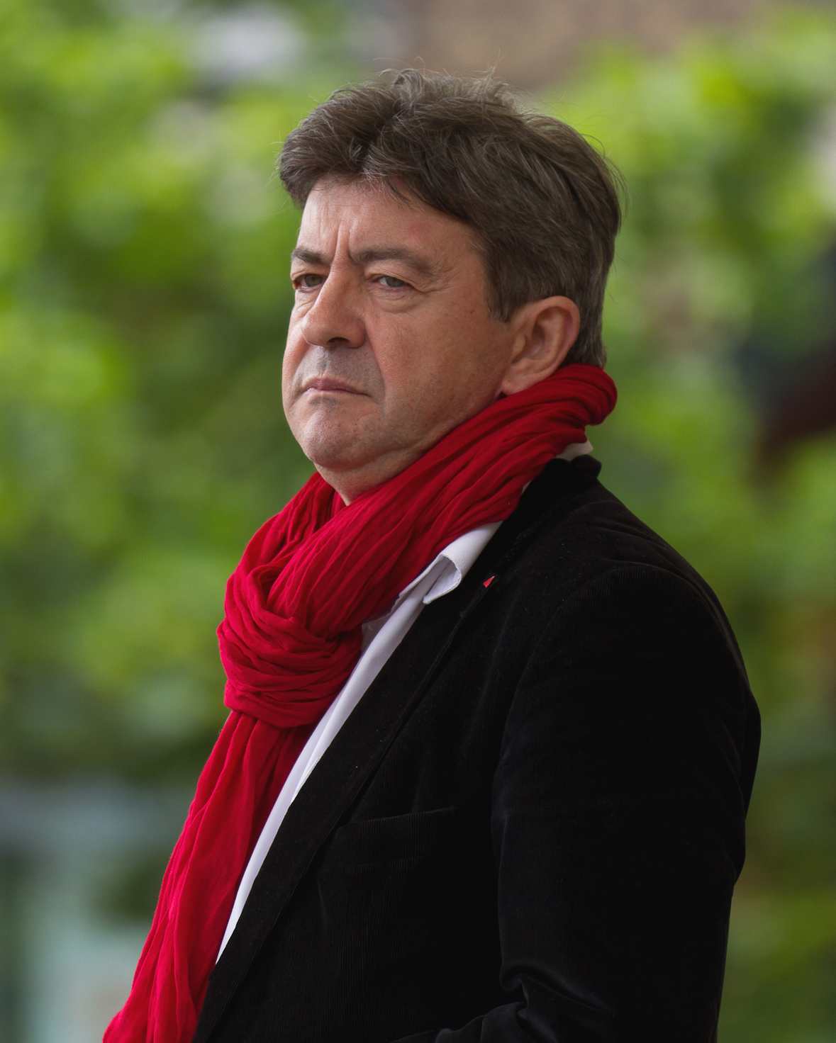 Marche pour une sixième République du Front de Gauche, Toulouse, allées Jean-Jaurès